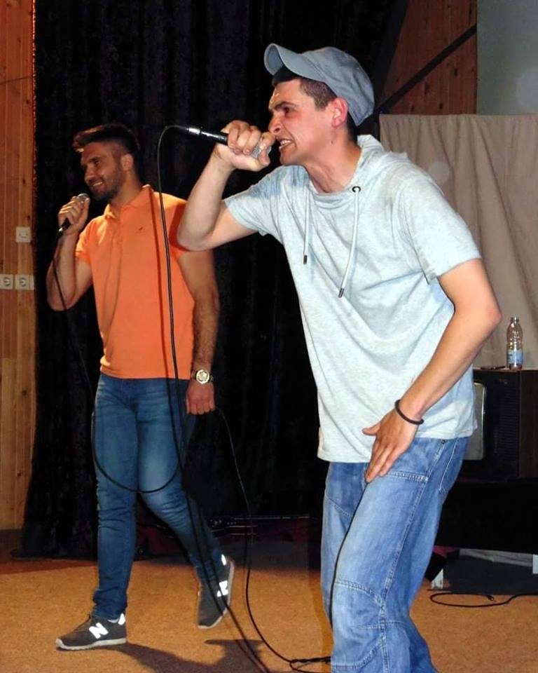 Srpski (latinica): Čače i Đavo hip-hop grupa iz Kuršumlije, Srbija